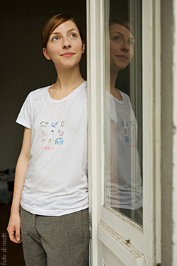 Schauspielerin Katharina Schüttler, fotografiert für Cut Magazin in Berlin von foto di matti.